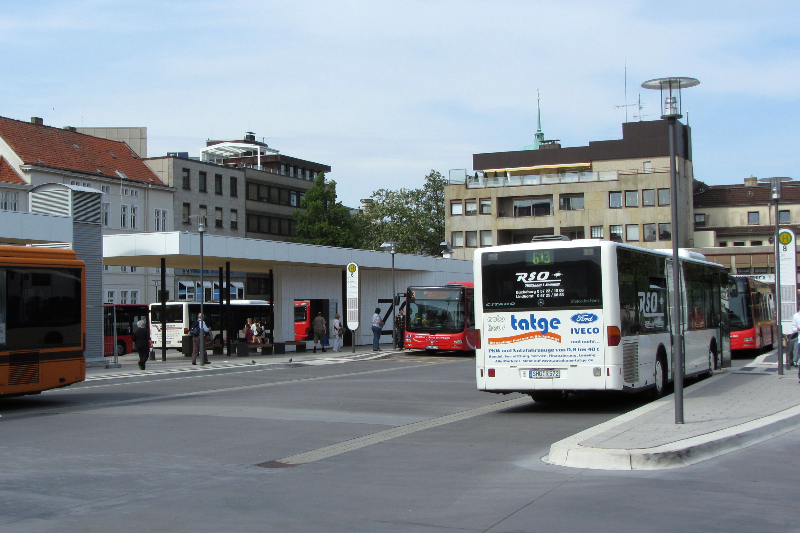 Minden. Neuer Busbahnhof (ZOB) am Rande der historischen Innenstadt.